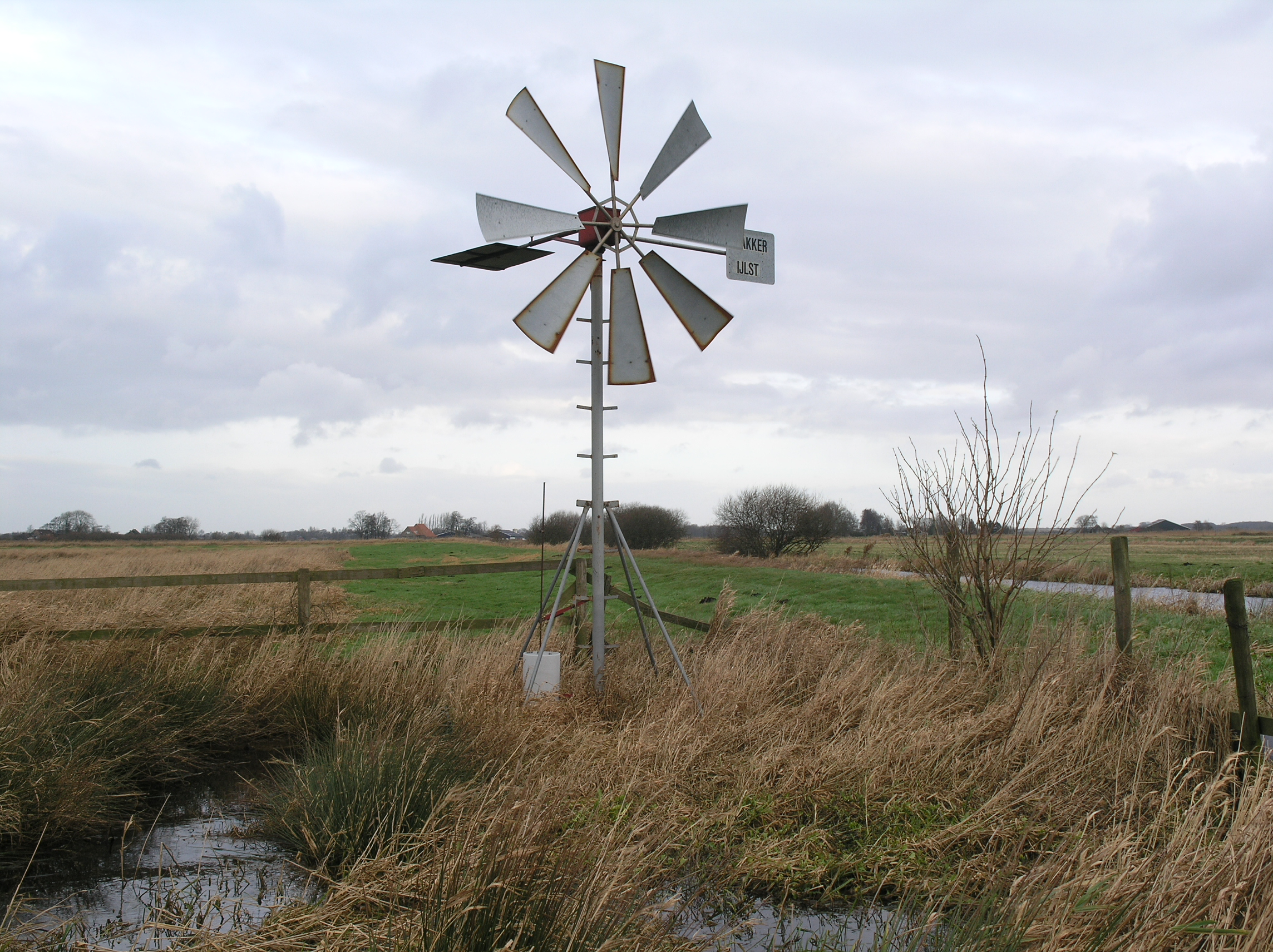 Tijnje Windmotor 2007